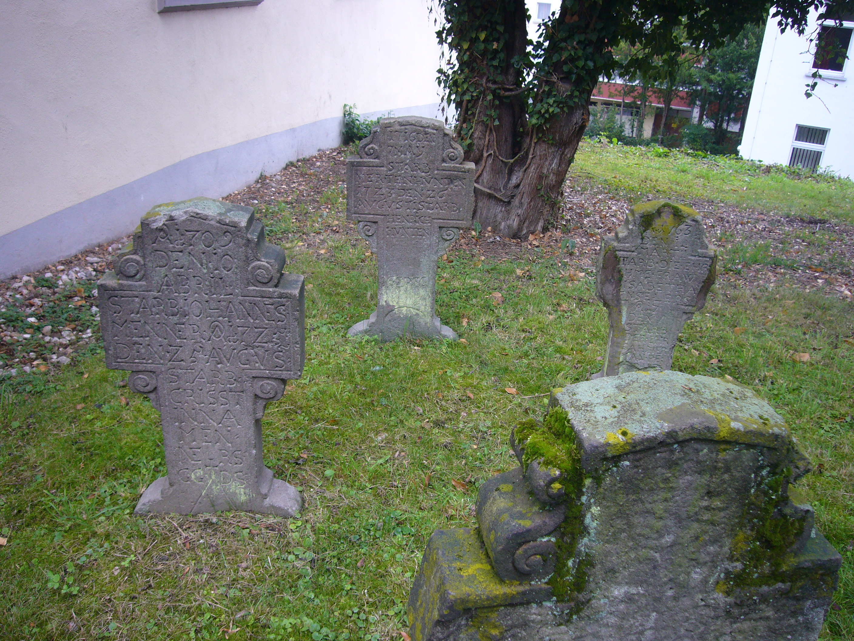 Grabkreuze an der Kirche Alt-St. Nikolaus in Kessenich